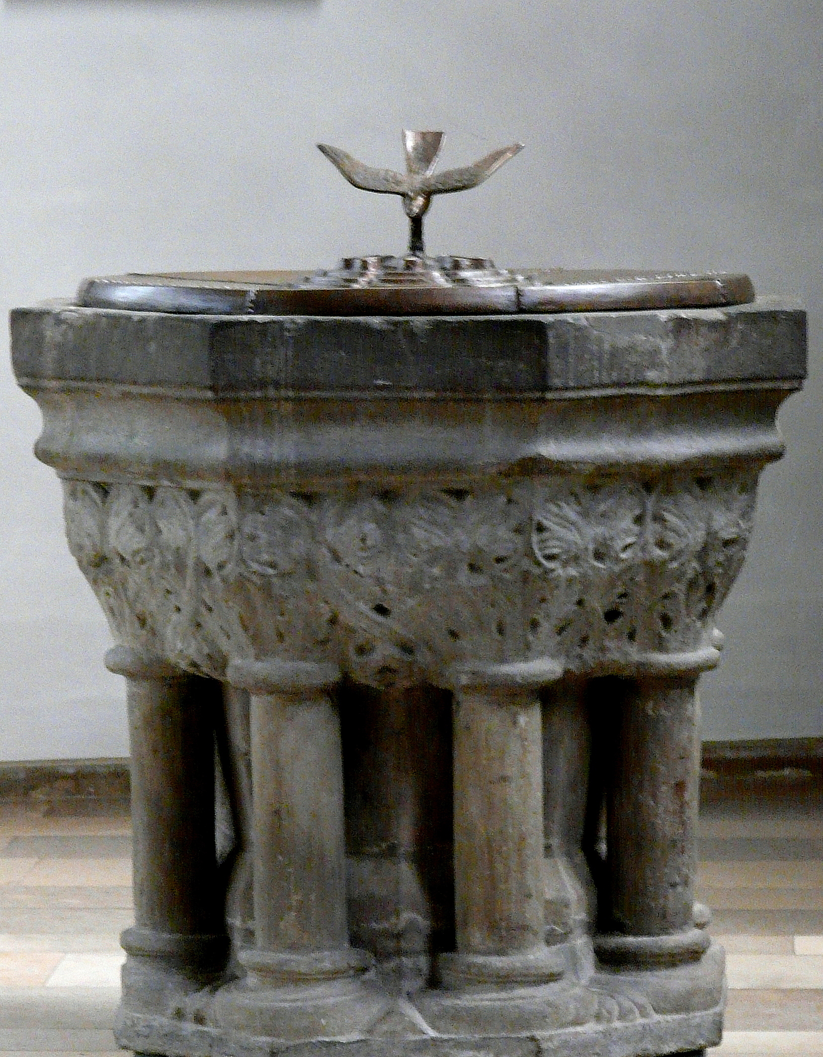 Bronzedeckel, 1980 von Willi Dirx für den spätromanischen Taufstein gestaltet, stellt eine Fontäne dar, aus der das Wasser des Lebens quillt als Symbol der Taufe, darüber der Hl. Geist in Form einer Taube